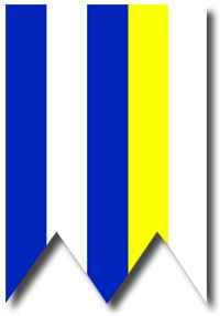 Flag of village Podbiel